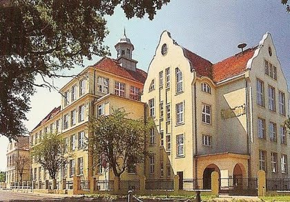 Denkmalgeschützte Schule 1 in Weißwasser in der Oberlausitz erbaut 1912